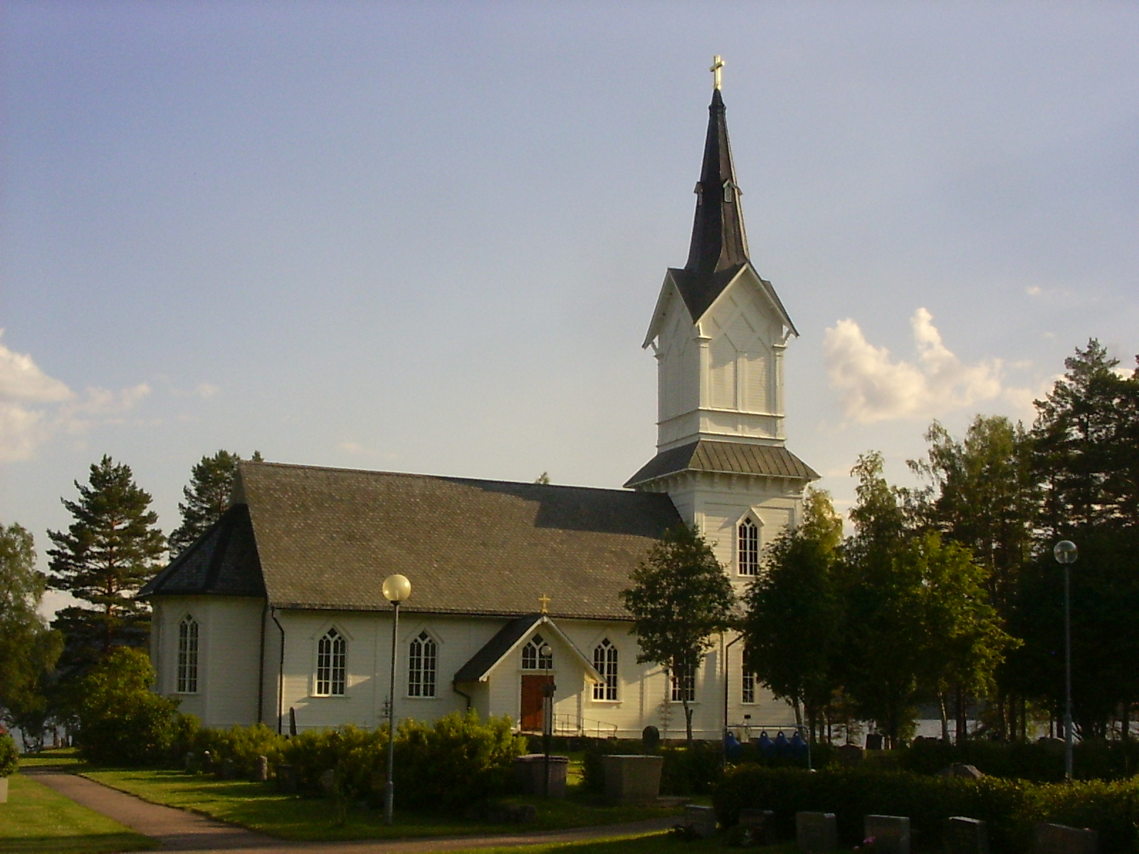 De kerk van Tyngsjö